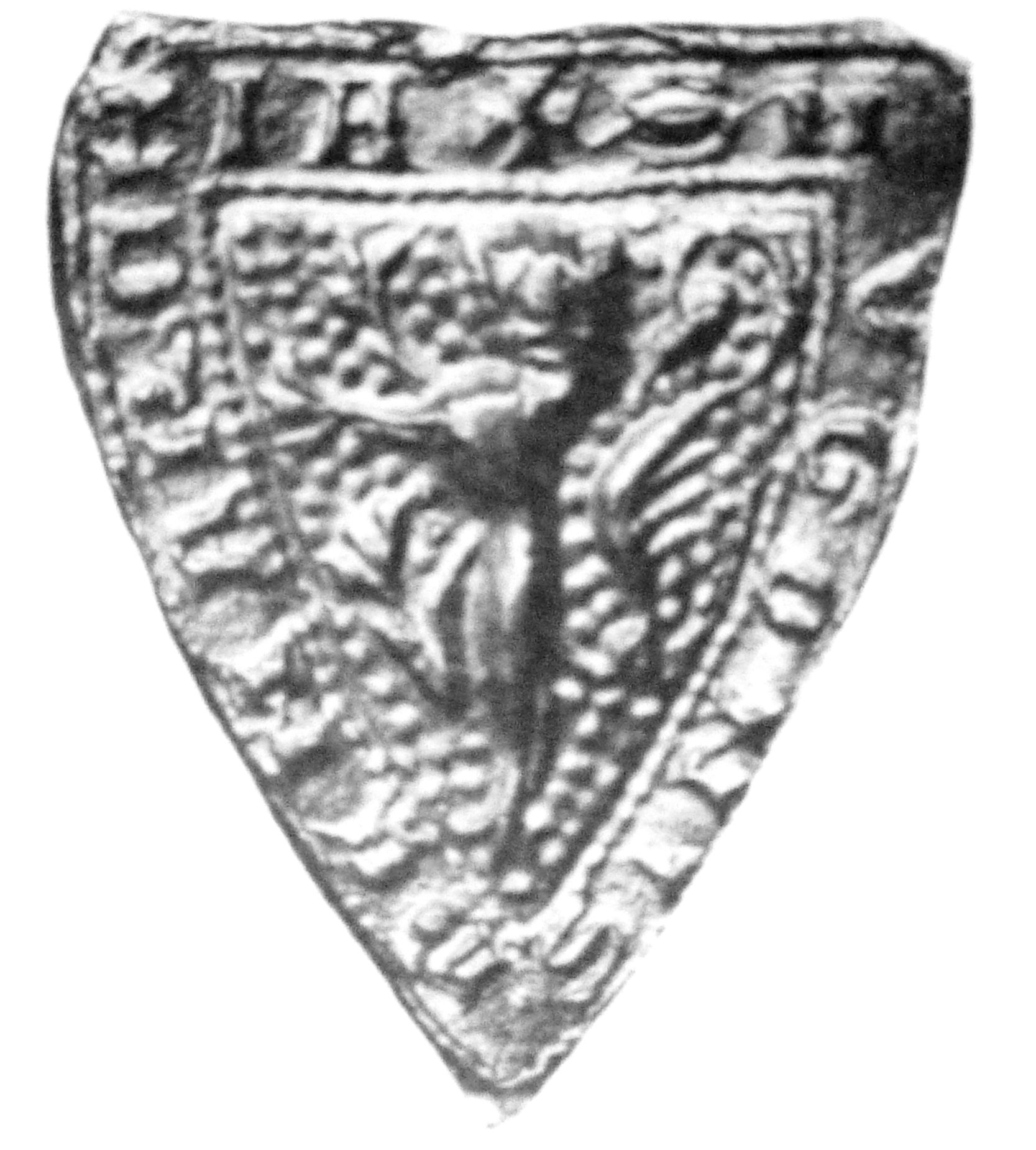 Siegel des Hugo von Marchia (1320) (HVGONIS DE MARCHIA) in Otto Posse: Die Siegel des Adels der Wettiner Lande. Band IV, Verlag Wilhelm Baensch Dresden 1908, Tafel 51 Nr. 4